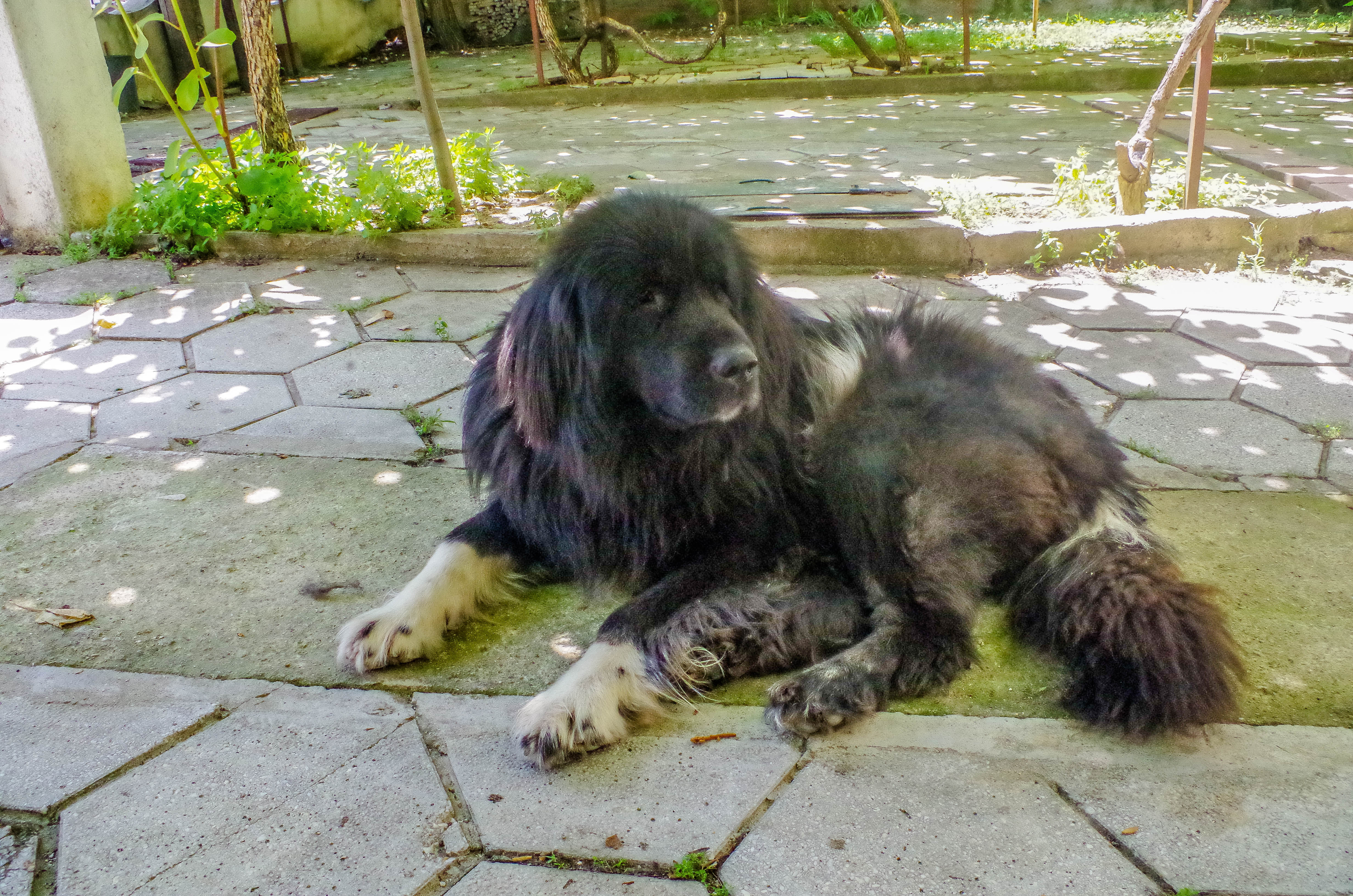 Karaman dog